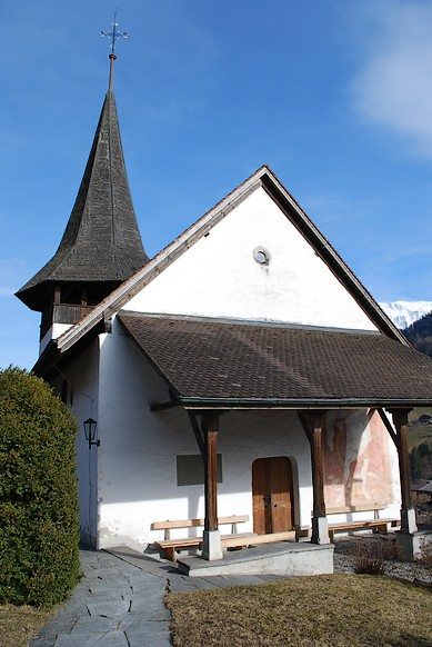 Vue extérieure de l'église d'Erlenbach: date du XIème s., mentionnée dès 1228, remaniée à diverses époques, notamment aux XV et XVIèmes s.